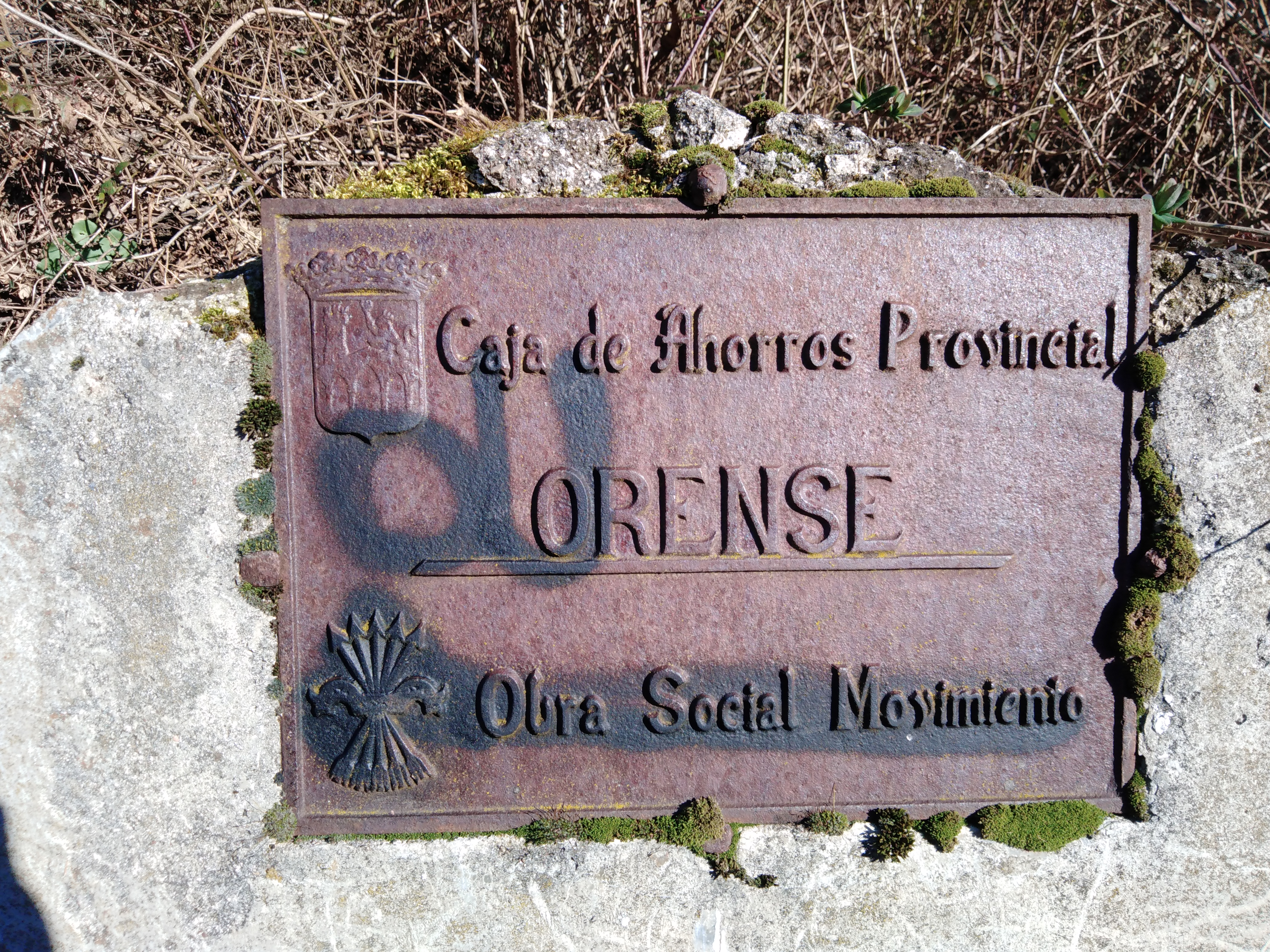 Placa da Caja de Ahorros Provincial de Orense e da Obra Social Movimiento, colocada nunha fonte nas Taboazas (Chandrexa de Queixa)